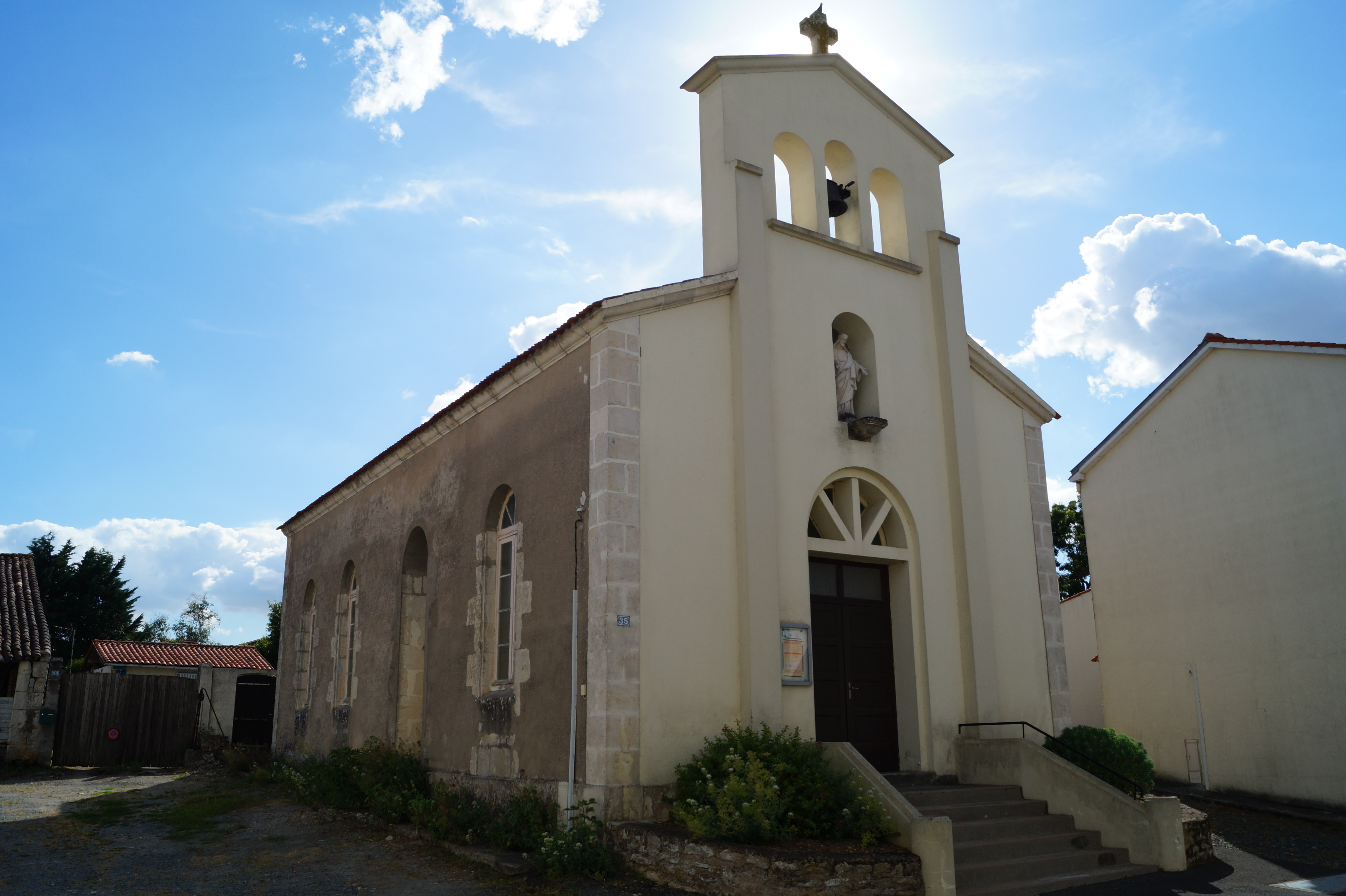 L’église du Sacré-Cœur de La Taillée depuis la rue du Huit-Mai.